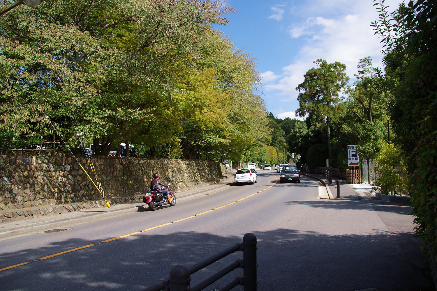 京都市北西部の観光道路「きぬかけの路」 龍安寺前で撮影。